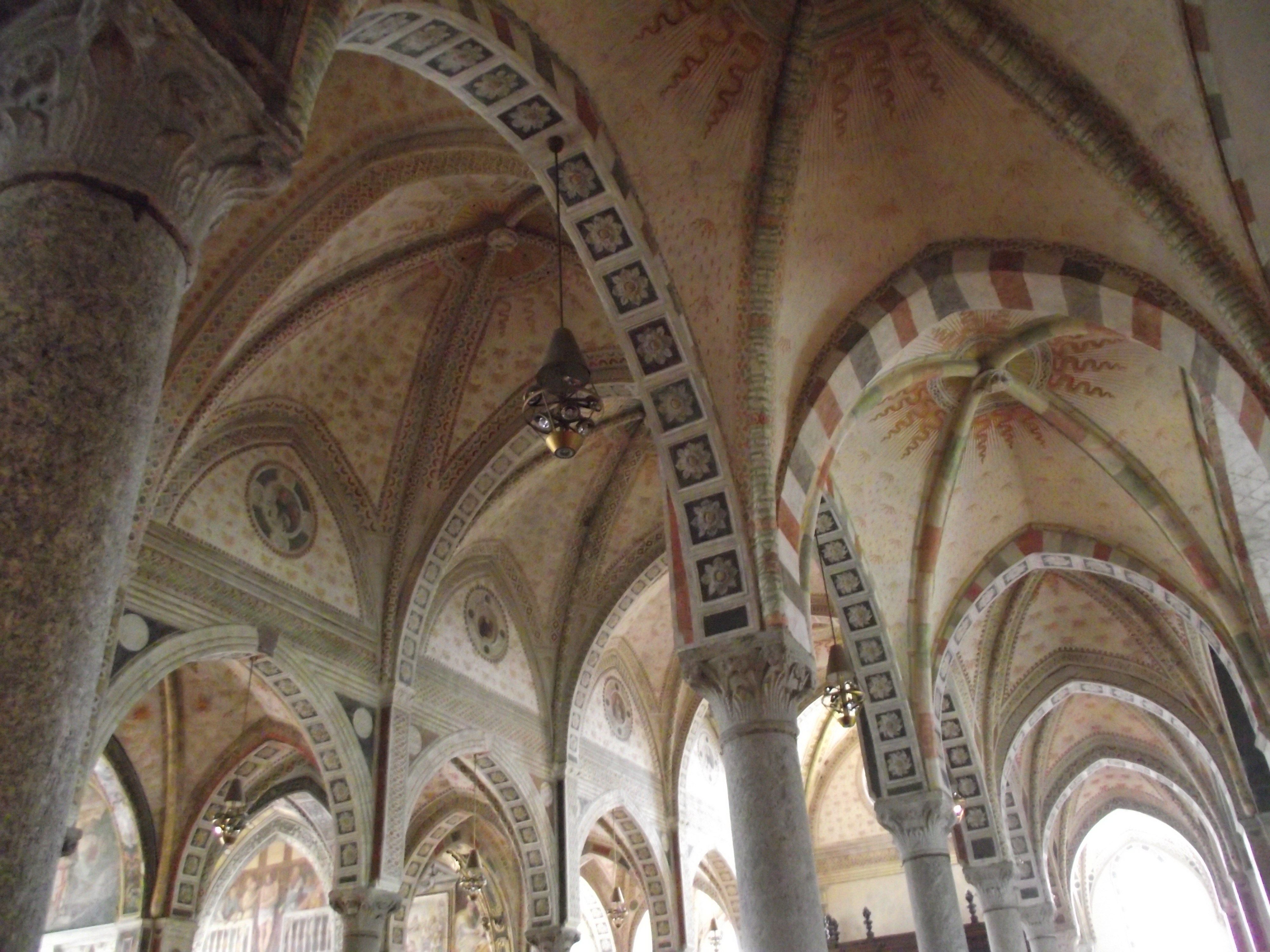 Interno